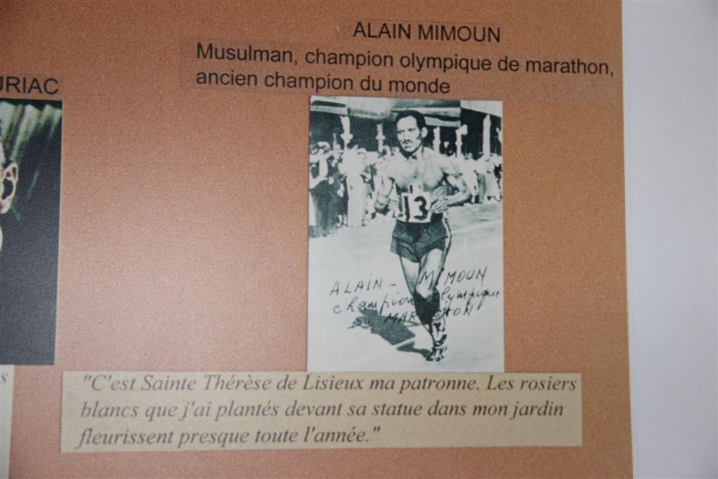 Photo d'Alain Mimoun à l'intérieur de la Basilique Sainte-Thérèse de Lisieux.